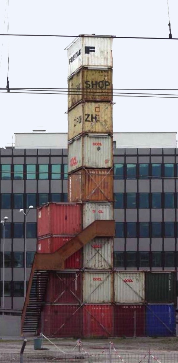 FREITAG-Shop an der Geroldstrasse in Zürich-West, Containerturm aus 17 Frachtcontainern, neben der Hardbrücke am Rande des ehemaligen Maag-Zahnradwerkes.